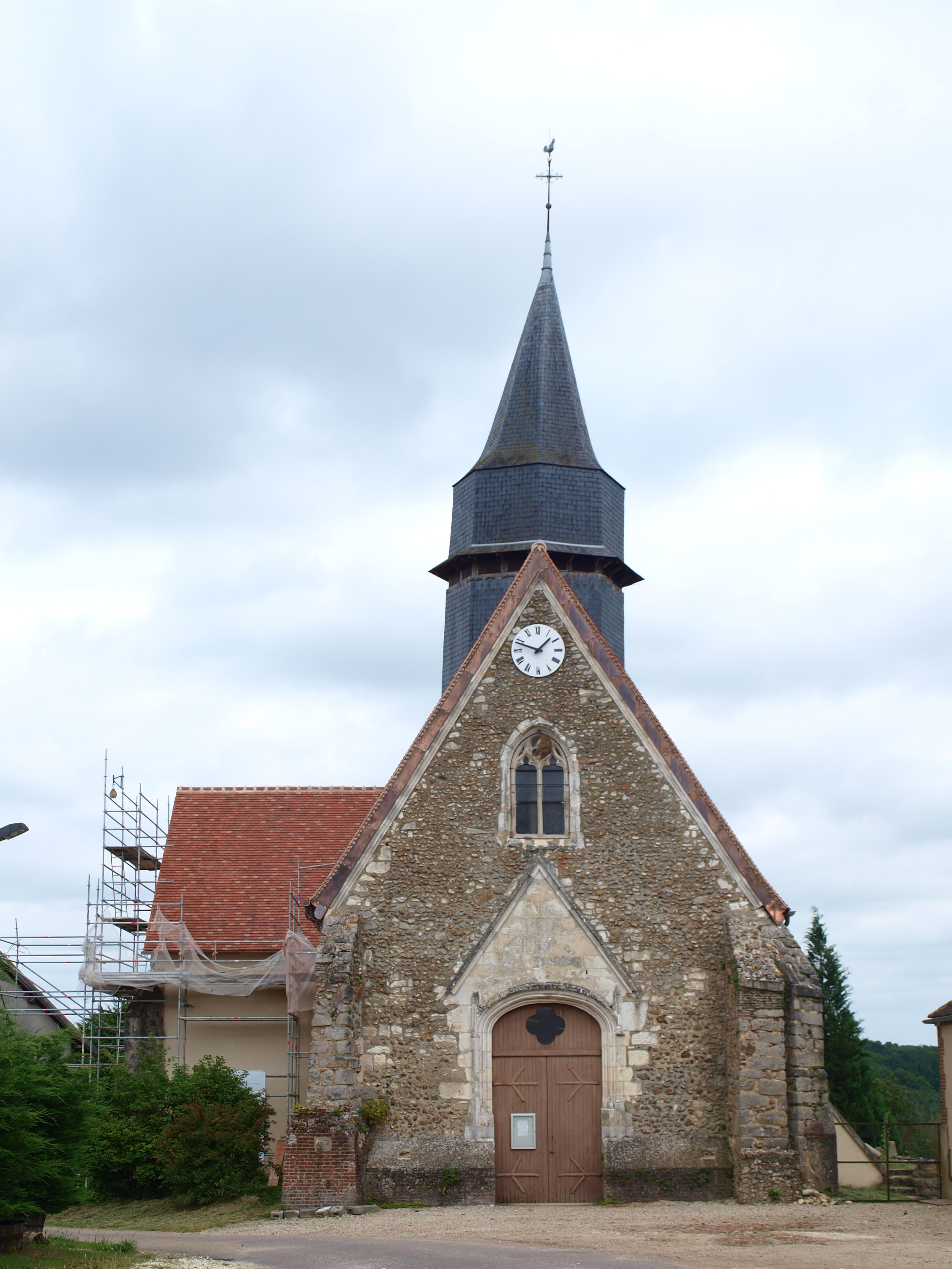 Sommecaise (Yonne, France) - église.